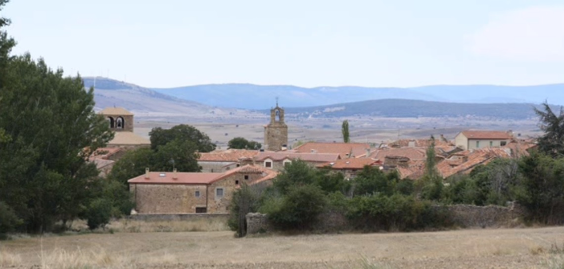 Vista de Carrascosa de la Sierra